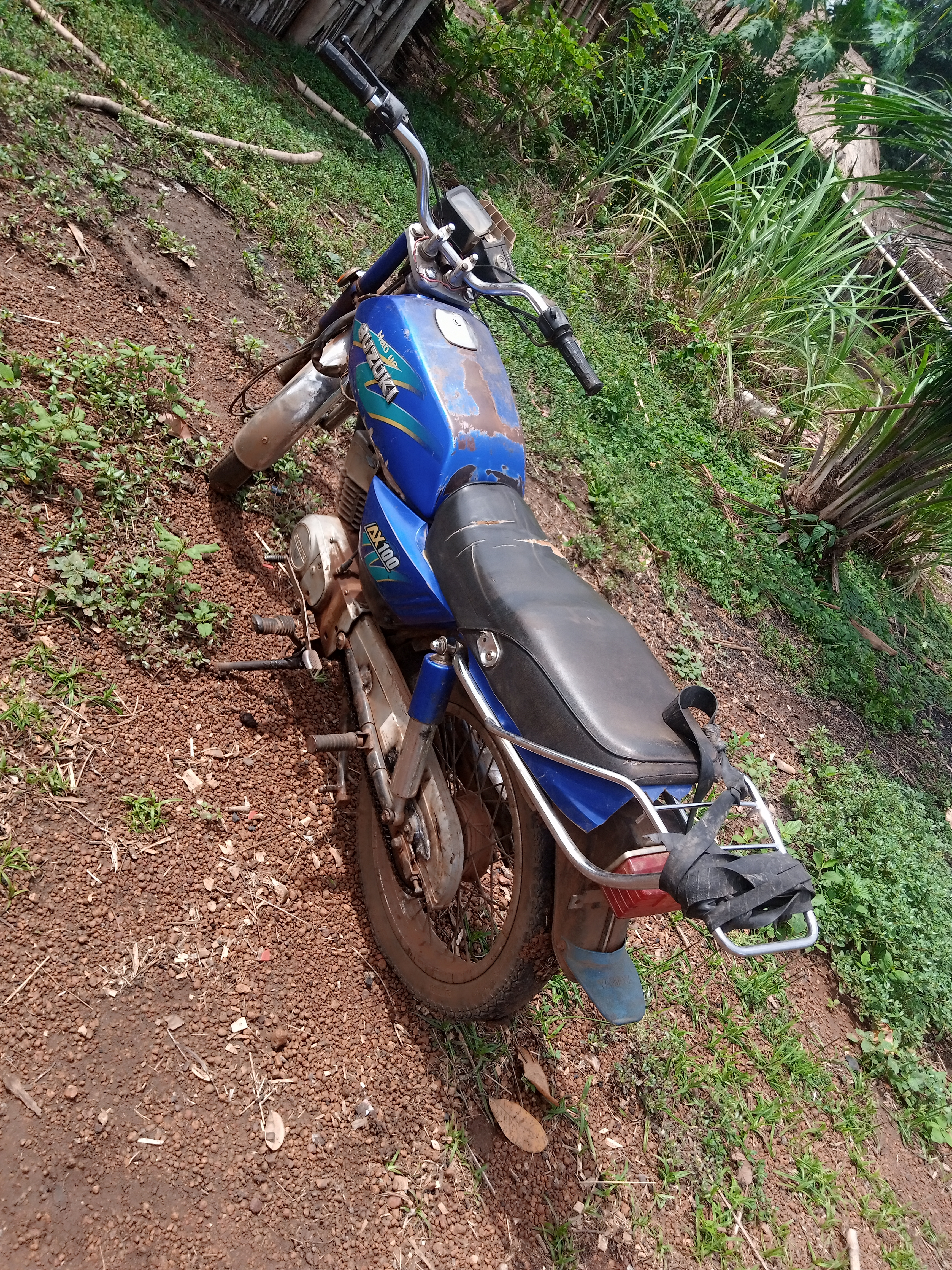 le transport à Pobé au Bénin This is an image with the theme "Africa on the Move or Transport" from: Benin